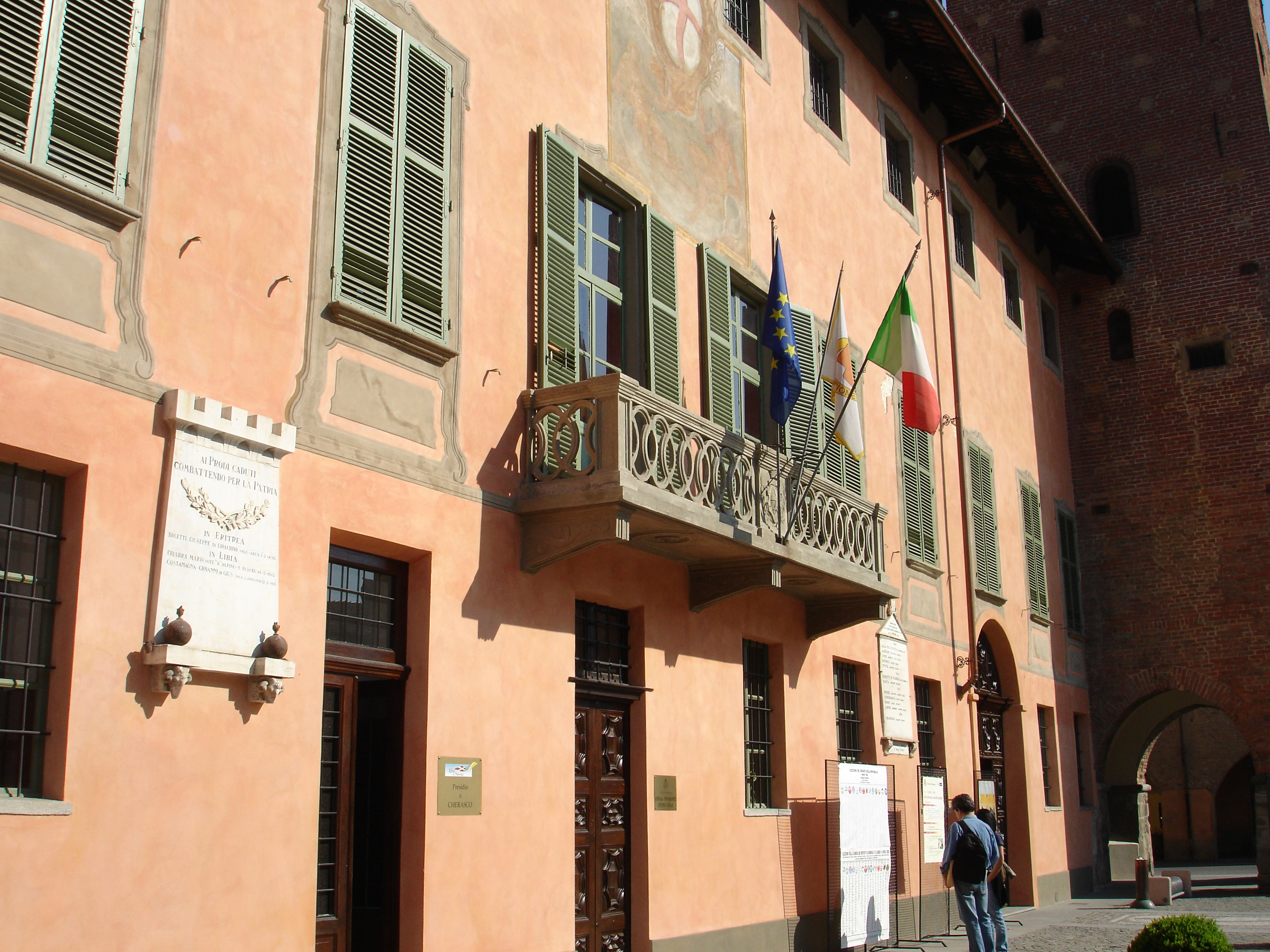 Cherasco (Cuneo): municipio